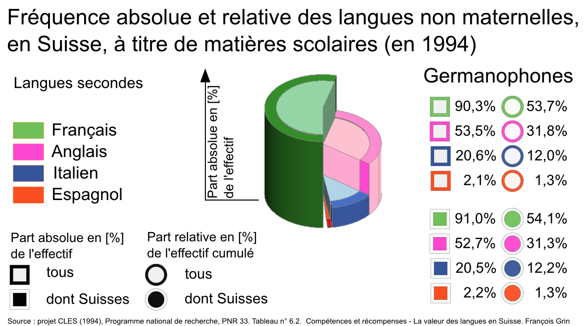 Fréquence absolue et relative des langues non maternelles, en Suisse, à titre de matières scolaires (en 1994). Pour les germanophones. Graphique réalisé sur la base du tableau n° 6.2, p. 110 du livre Compétences et récompenses - La valeur des langues en Suisse de François Grin, Éditions universitaires Fribourg, Suisse, 1999 (ISBN 2-8271-0843-7)